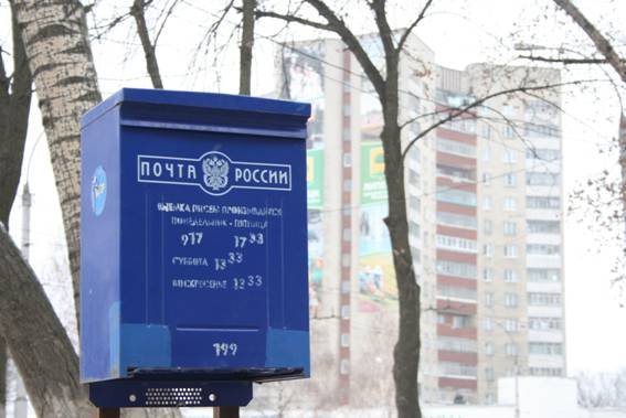 Почтовый ящик в Липецке